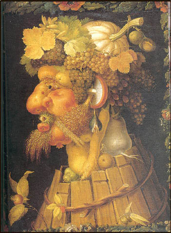 Autumnlabel QS:Len,"Autumn" label QS:Lde,"Herbst"